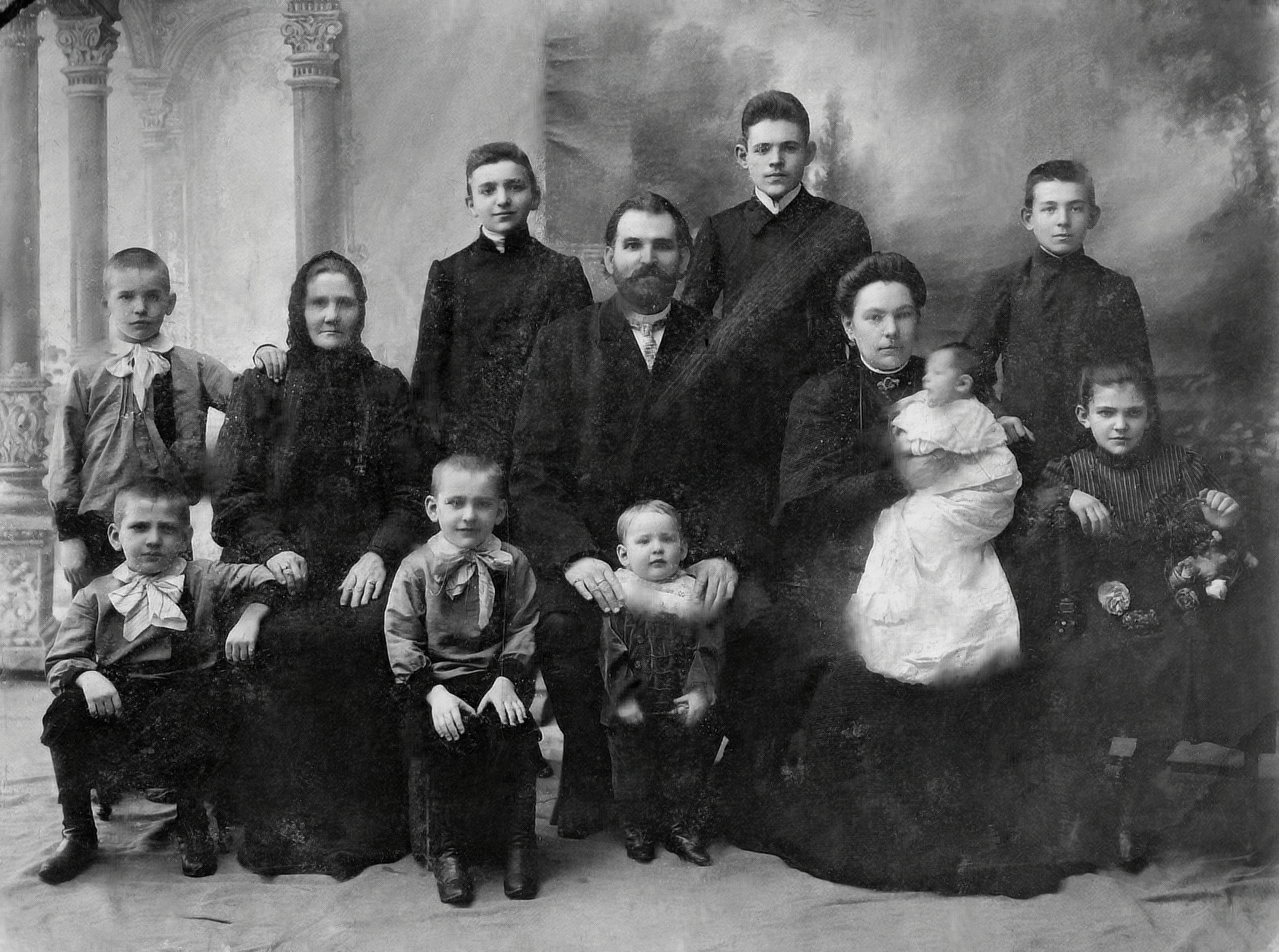 Фотография семьи Степана Фёдоровича Леонова